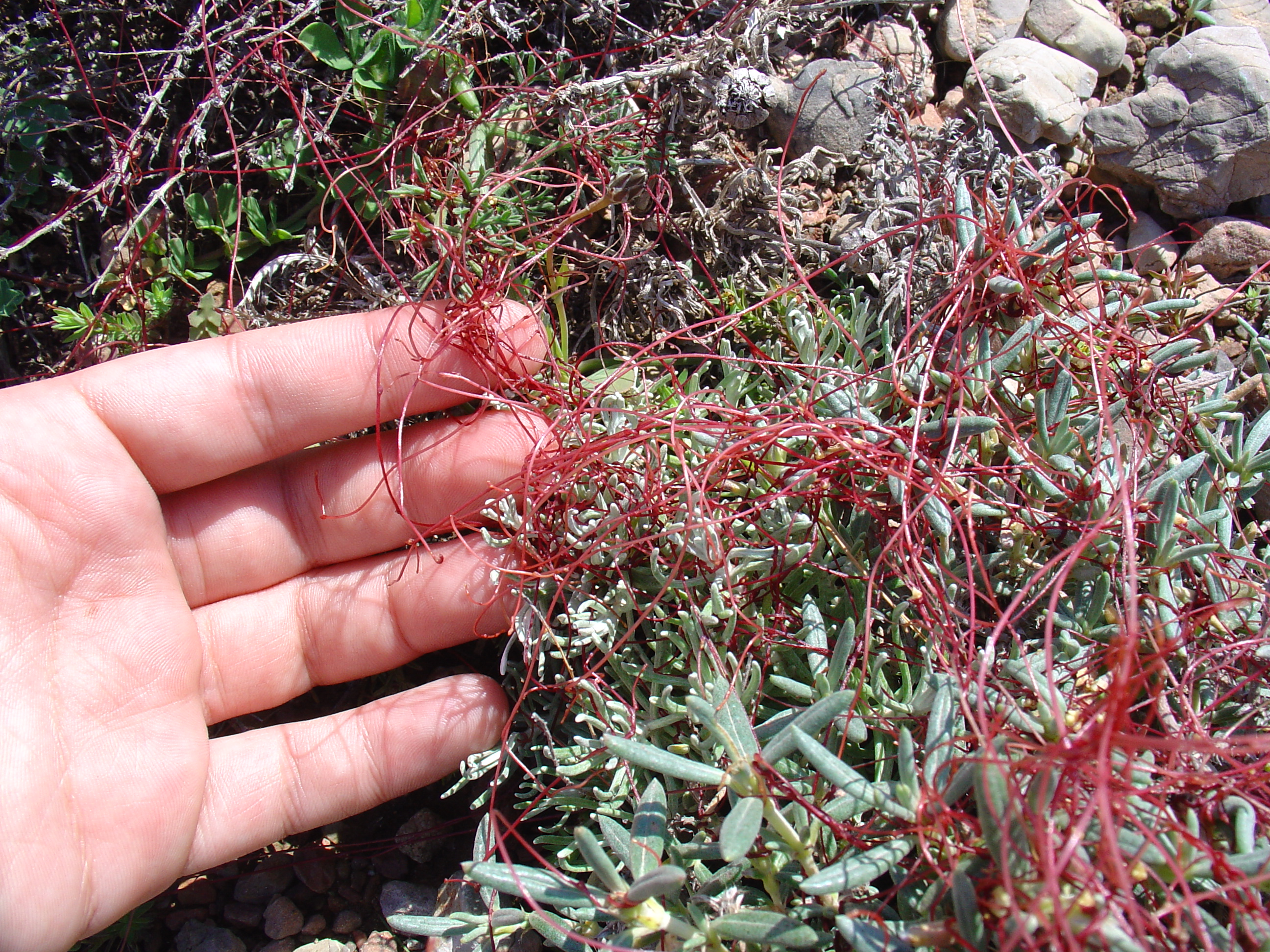 Cuscuta epithymum from Cabo de Palos, Murcia, Spain